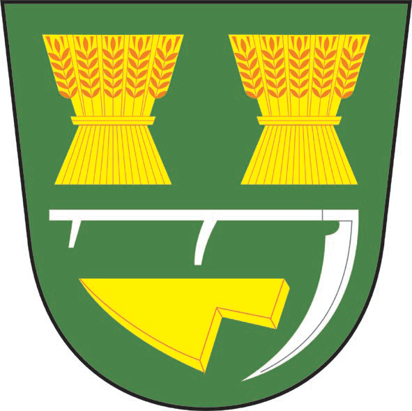 znak obce Tichov